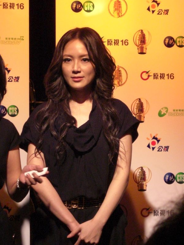 第43屆金鐘獎台灣公共廣播電視集團慶功宴，電視金鐘獎迷你劇集編劇獎得獎者尹馨。